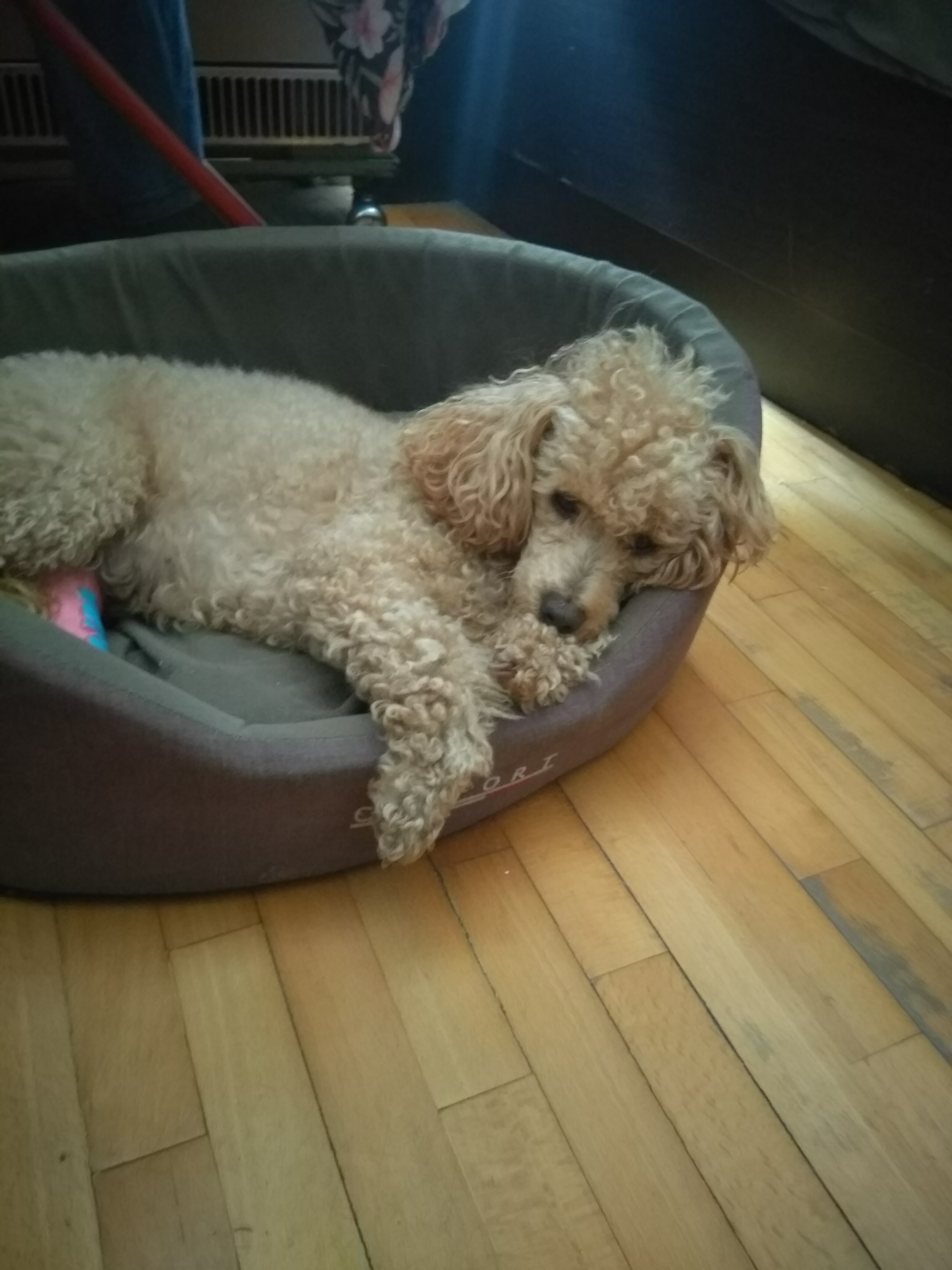 Пудла дрема у свом кревету